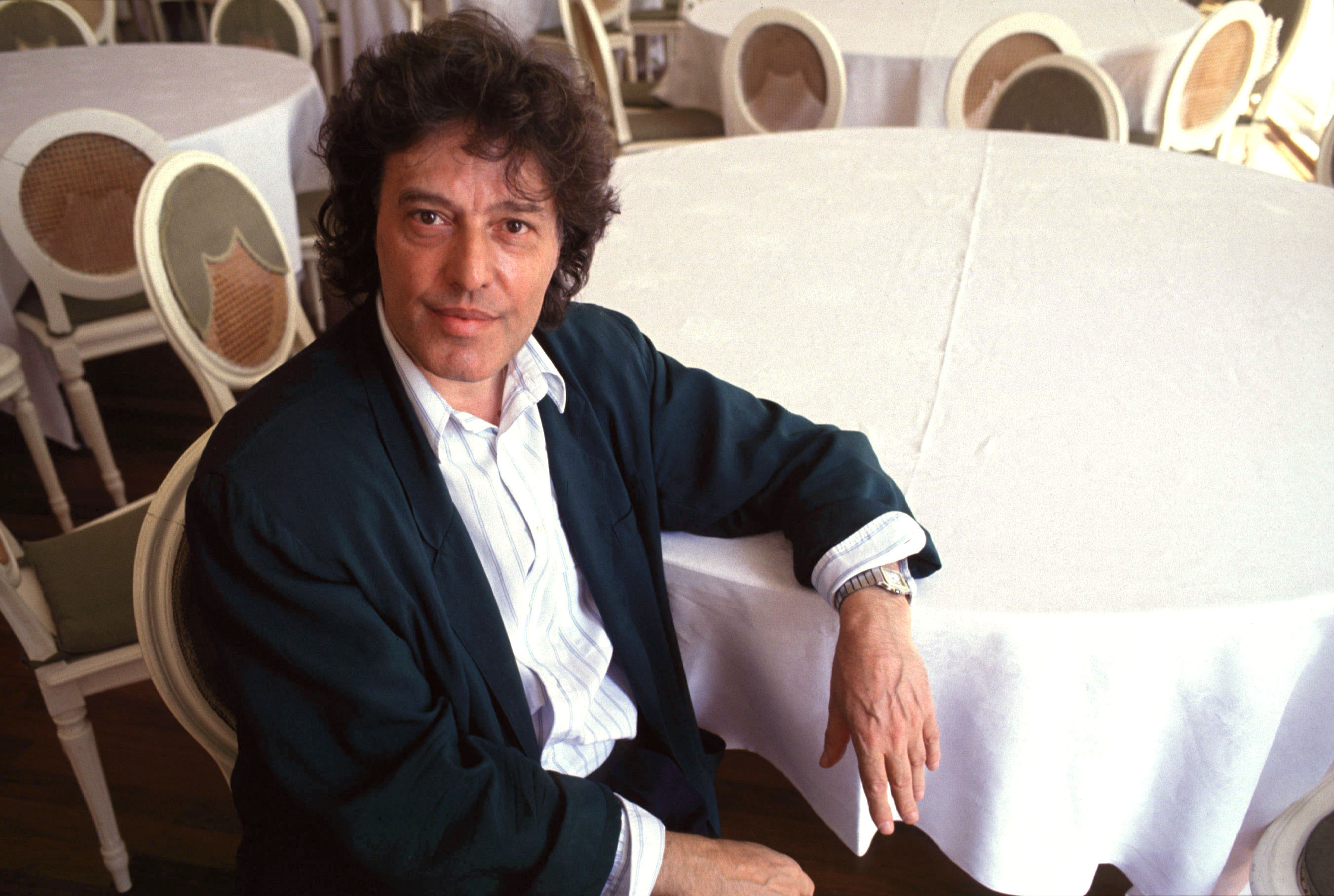 Il regista Tom Stoppard alla Mostra del Cinema di Venezia del 1990